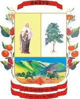 Escudo del Municipio Miranda Edo. Carabobo